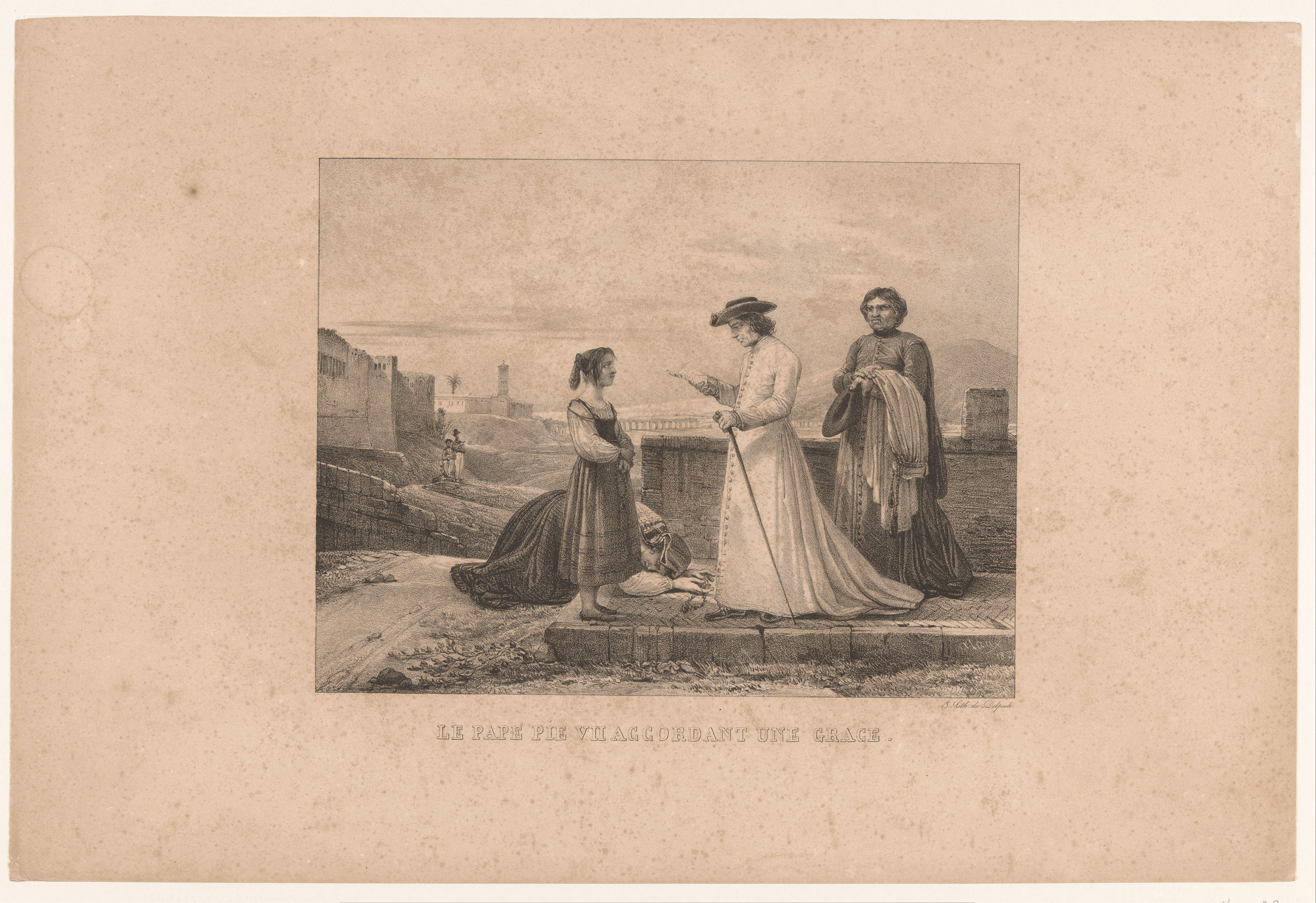 IdentificatieTitel(s): Paus Pius VII verleent gratie aan een meisjeLe pape Pie VII accordant une grace (titel op object)Objecttype: prent Objectnummer: RP-P-1905-5482Opschriften / Merken: verzamelaarsmerk, verso, gestempeld: Lugt 2228Omschrijving: De paus overhandigt het meisje een brief, terwijl haar moeder in dankbaarheid aan zijn voeten geknield ligt en een dienaar toekijkt. Op de achtergrond een landschap buiten de stadsmuren van Rome.VervaardigingVervaardiger: prentmaker: Jean Paul Alaux (vermeld op object)drukker: veuve Delpech (Naudet) (vermeld op object)Plaats vervaardiging: prentmaker: Bordeauxdrukker: ParijsDatering: 1827Materiaal: papier Techniek: krijtlithografieAfmetingen: blad: h 342 mm × b 508 mmOnderwerpWat: popeabsolution, forgiveness of sins ~ part of the confessiongirl (child between toddler and youth)Waar: RomeWie: Pius VIIVerwerving en rechtenVerwerving: aankoop 1905Copyright: Publiek domein